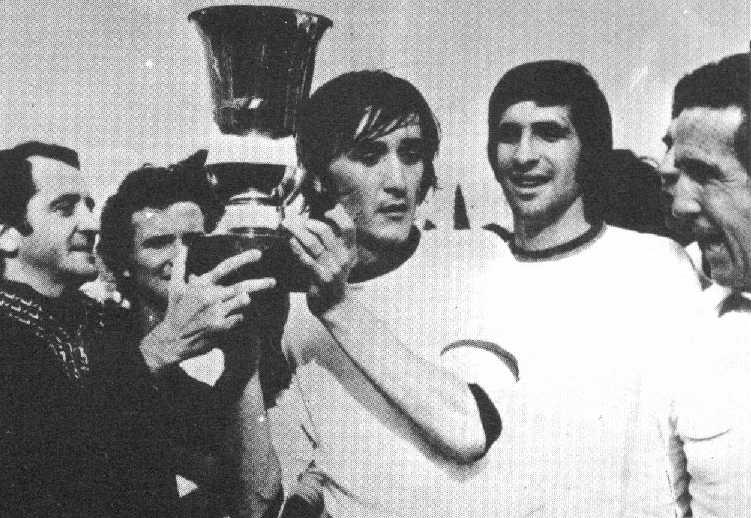 Roma (Italia), stadio Olimpico, 24 giugno 1972. Il capitano dell'A.S. Roma, Franco "Ciccio" Cordova, solleva il trofeo della Coppa Anglo-Italiana 1972 dopo la vittoriosa finale sul Blackpool F.C. (3-1); si riconoscono, tra i romanisti, il presidente Gaetano Anzalone (estrema sinistra) e l'allenatore Helenio Herrera (estrema destra).